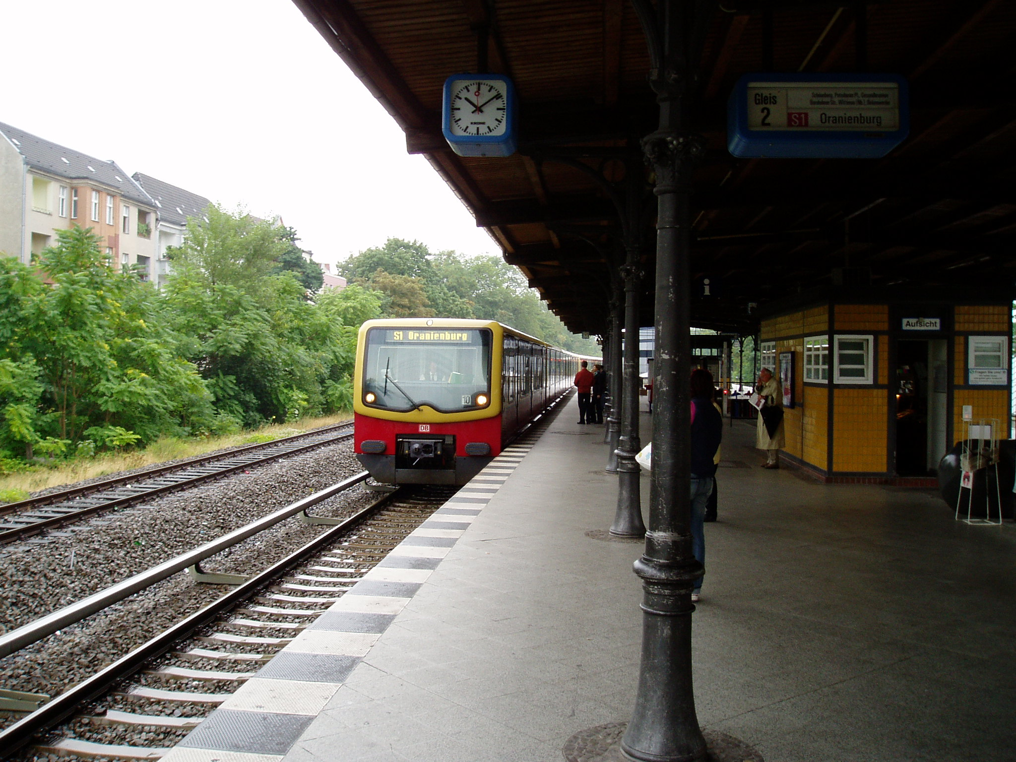 Berlin Bahnhof Rathaus Steglitz, Bahnsteig der S-Bahn mit Zug Richtung Norden